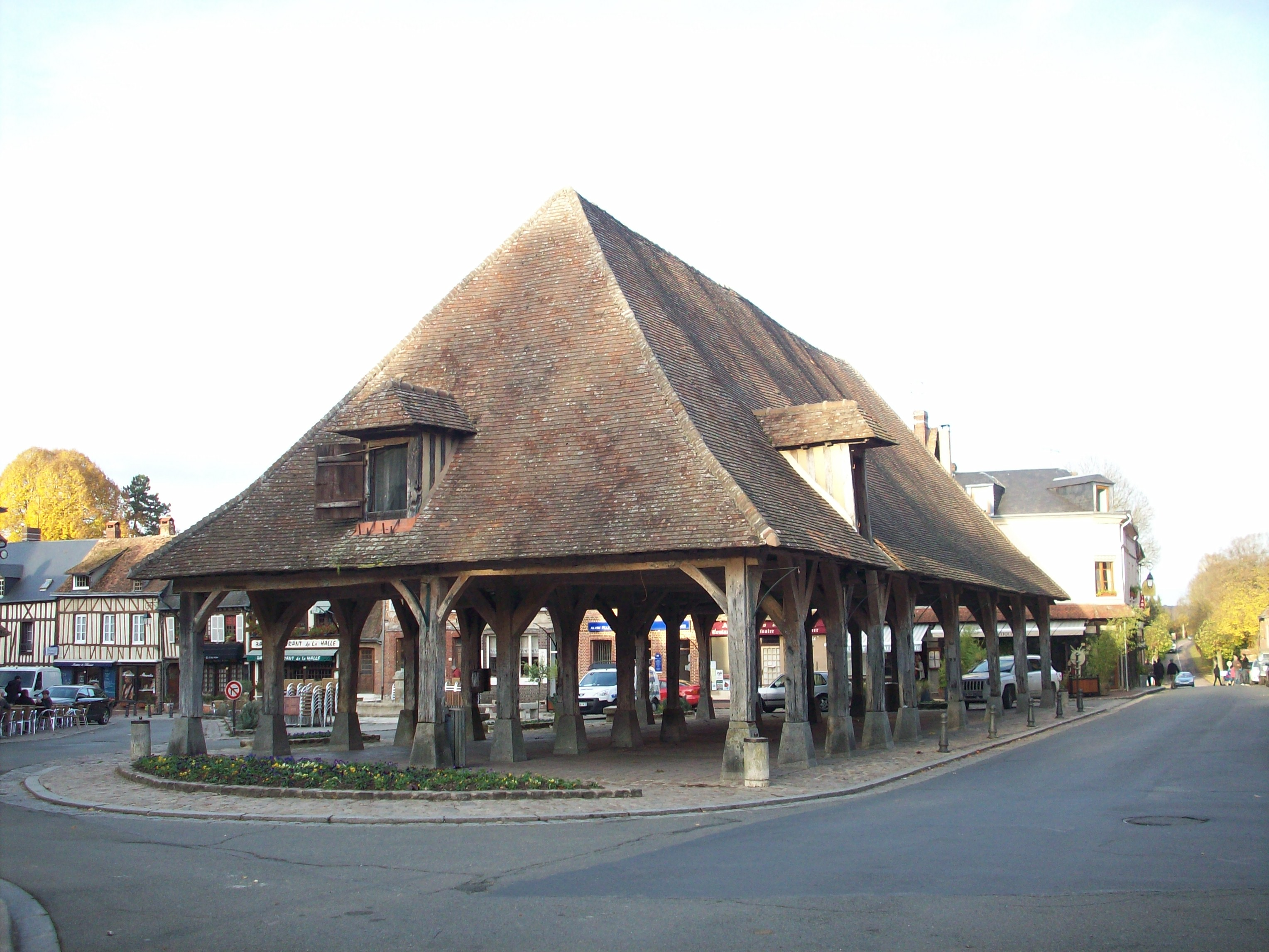 Halles en bois du XVIIe siècle, restaurées en 1776 par le duc de Penthièvre.